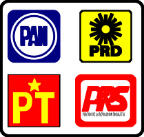 Alianza para el Cambio (PAN-PRD-PT-PRS)